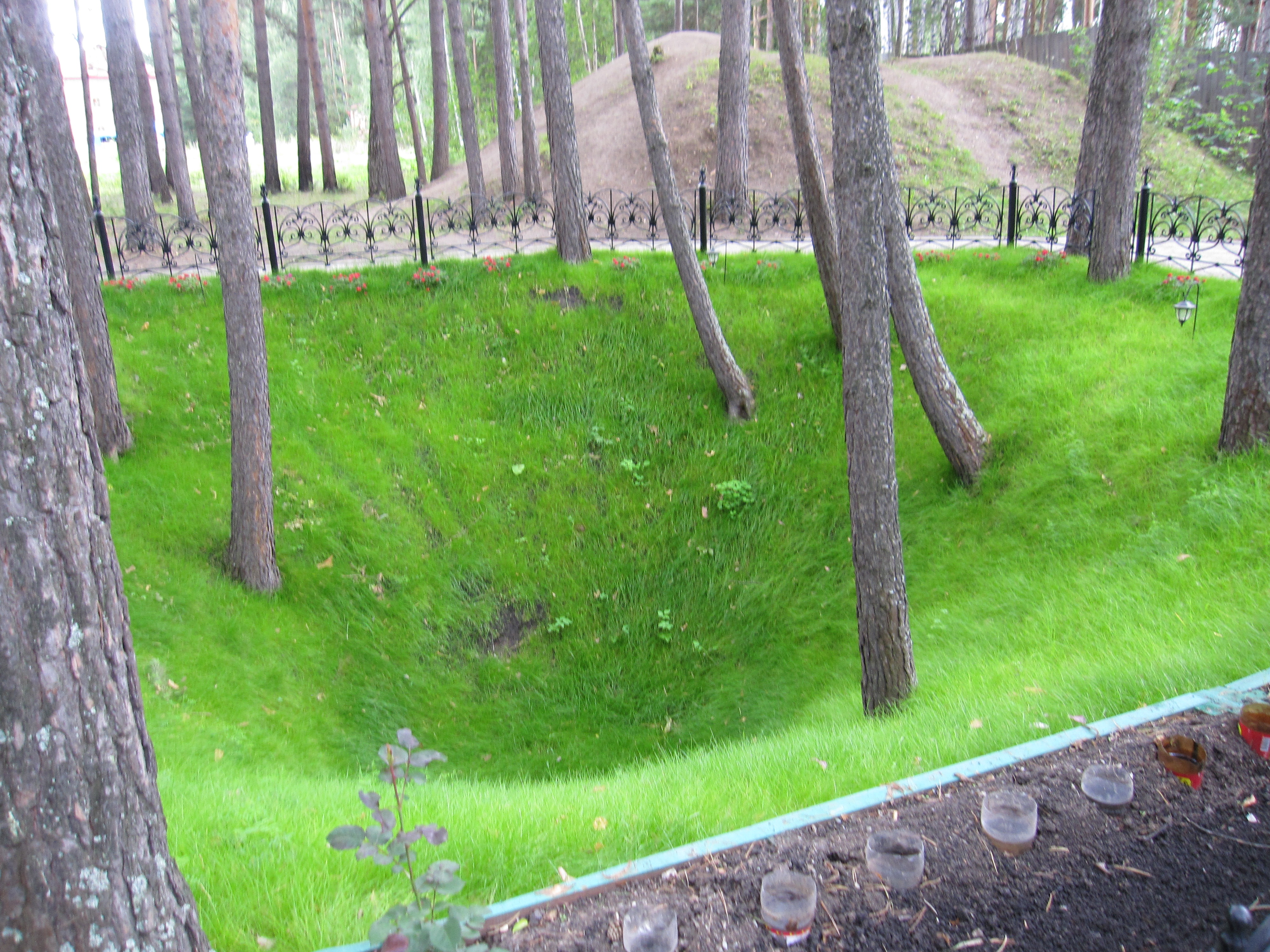 Место, где 18 июля 1918 г. были казнены алапаевские мученики: (дорога Верхняя Синячиха – Нижняя Синячиха), Алапаевский район, Свердловская область